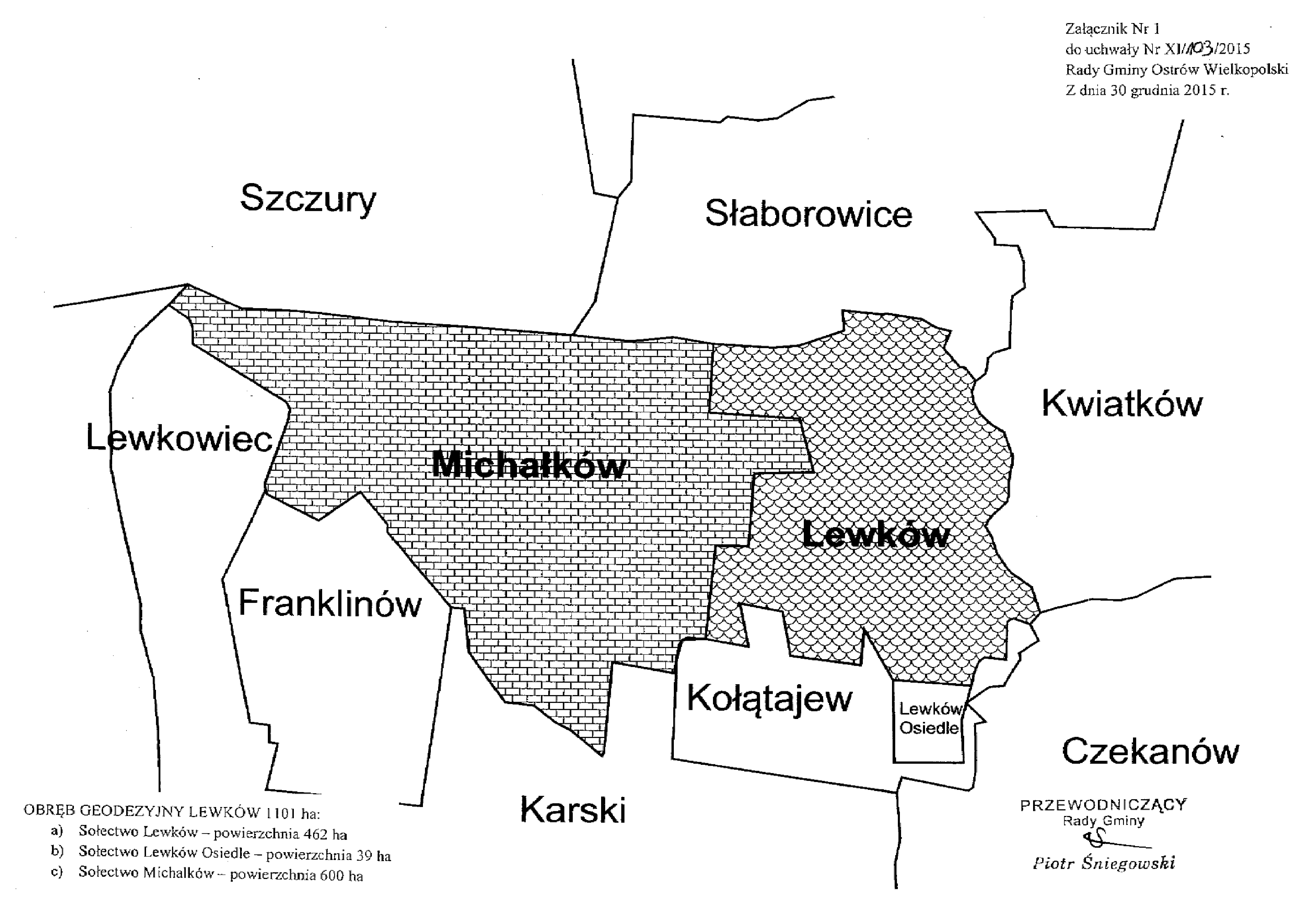 Mapa powierzchni sołectwa Michałków na tle innych sołectw